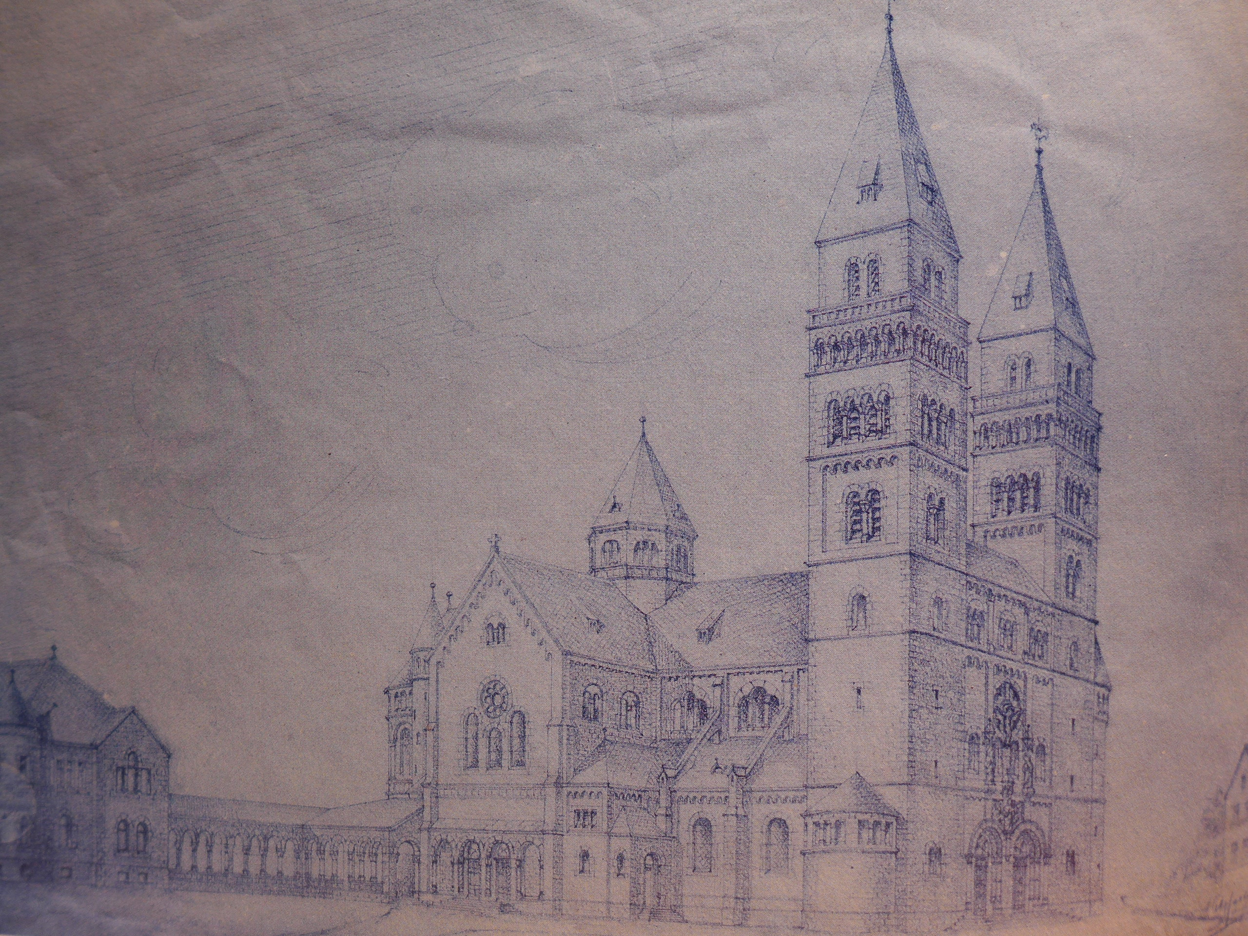 Entwurf des Architekten Wilhelm Hector zum Neubau des Saardomes aus dem Jahr 1906 (Pfarrarchiv Hl. Sakrament)